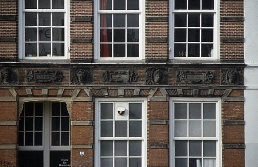 maskerstenen en cartouches Oude Singel 72 Leiden Mars,Ceres, Venus,Bacchus / DIT IS IN DEN VERGULDEN GECROONDEN HOU HAMER